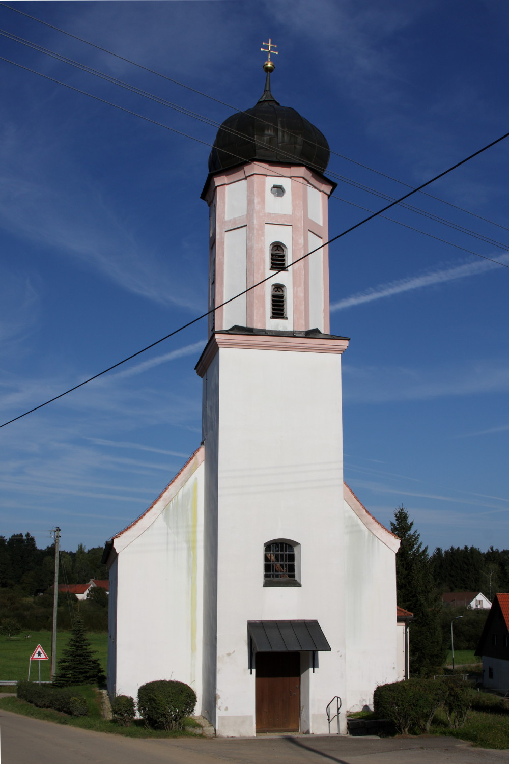 Kern spätmittelalterlich, 1736 umgebaut; mit Ausstattung.This is a photograph of an architectural monument.